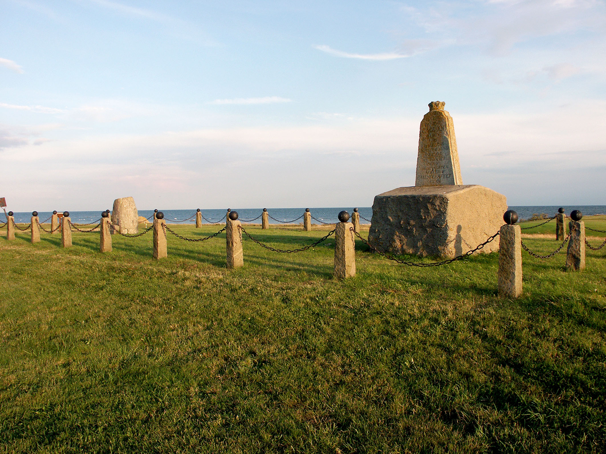 Stavsten, Skåne. Monument över Karl XII:s landstigning 1715.